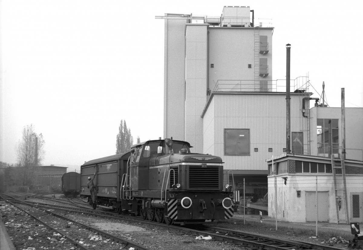 Ein Zug mit Lok D 5 rangiert zwischen Gwinnerstraße und "Am Erlenbruch" nahe der Flinschstraße, 26. Oktober 1977